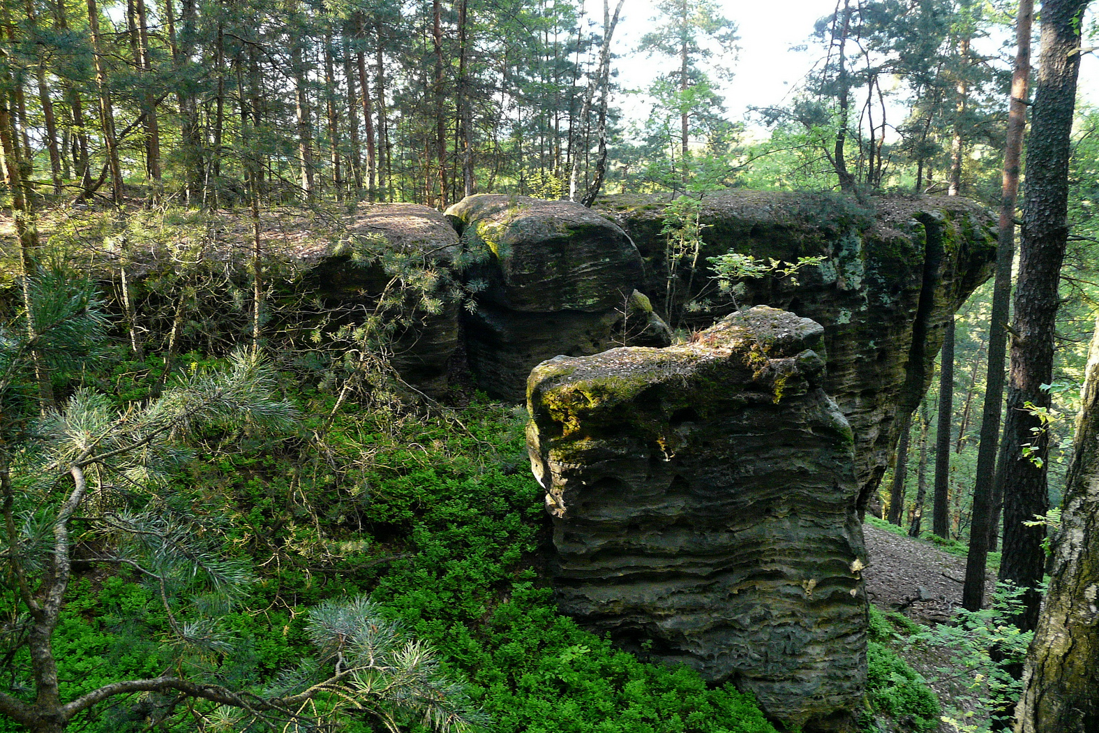 Pískovcové skály na Drnclíku, Housecké vrchy